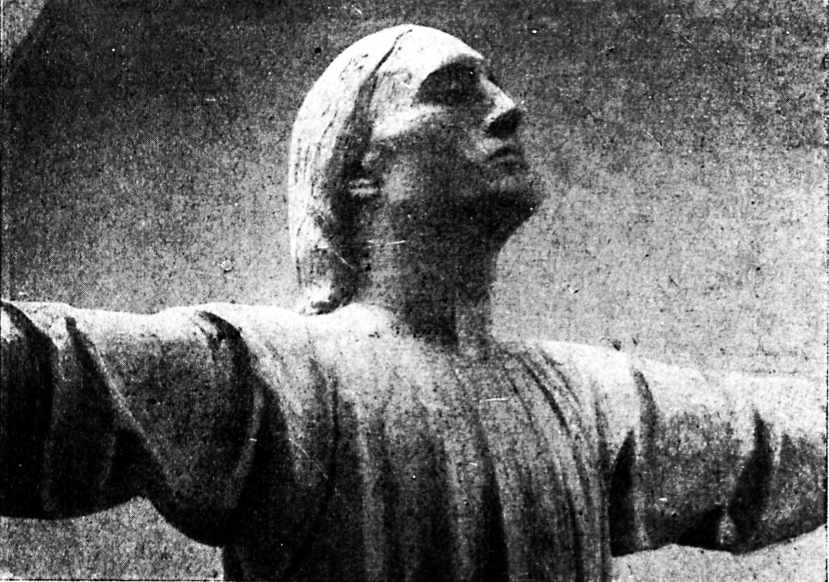 Krieger-Ehrenmal der im Ersten, nach 1945 Ersten und Zweiten, Weltkrieg gefallenen Gemeine-Mitglieder der Stralsunder Nikolai-Gemeinde